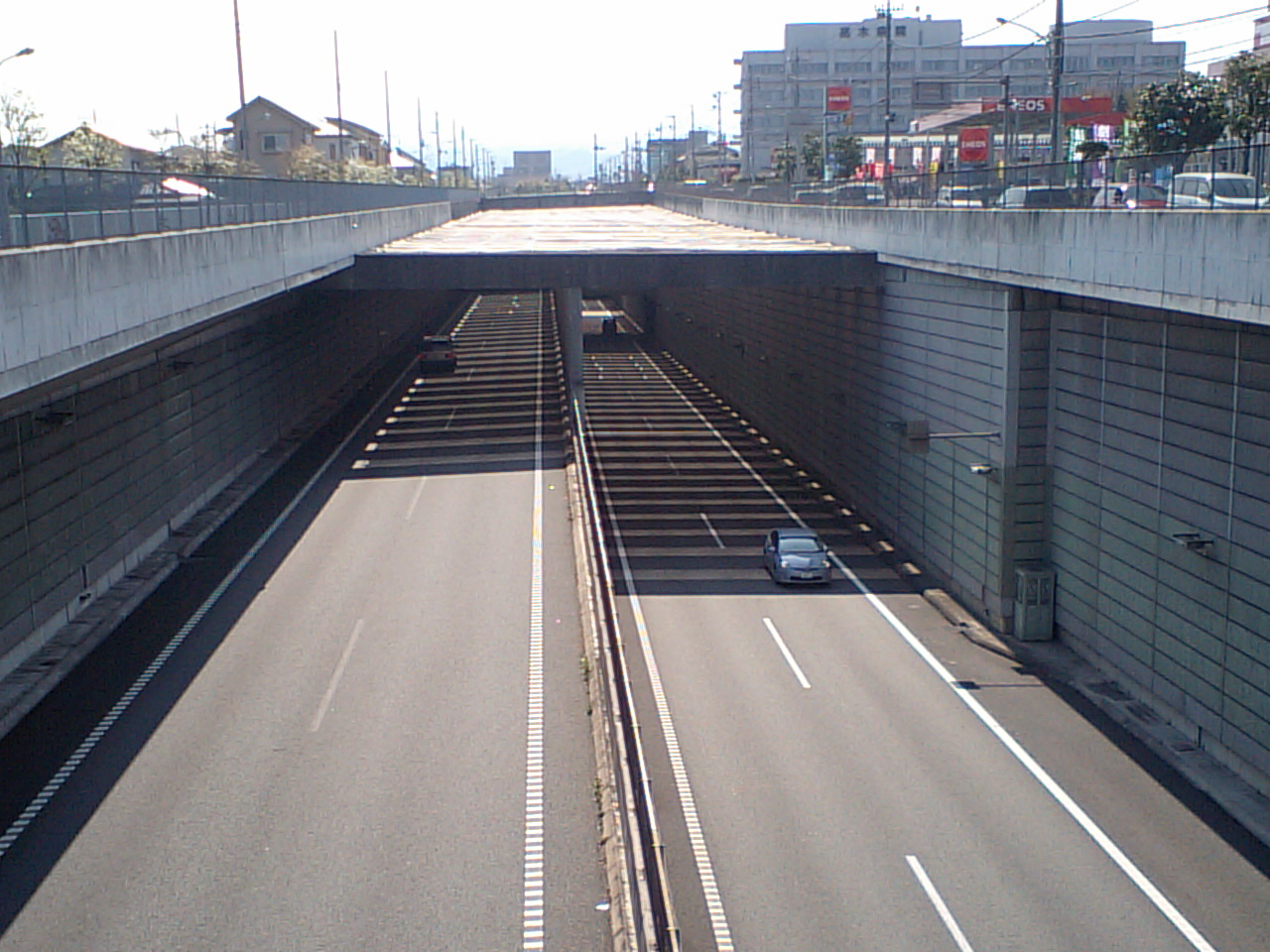 圏央道青梅トンネル